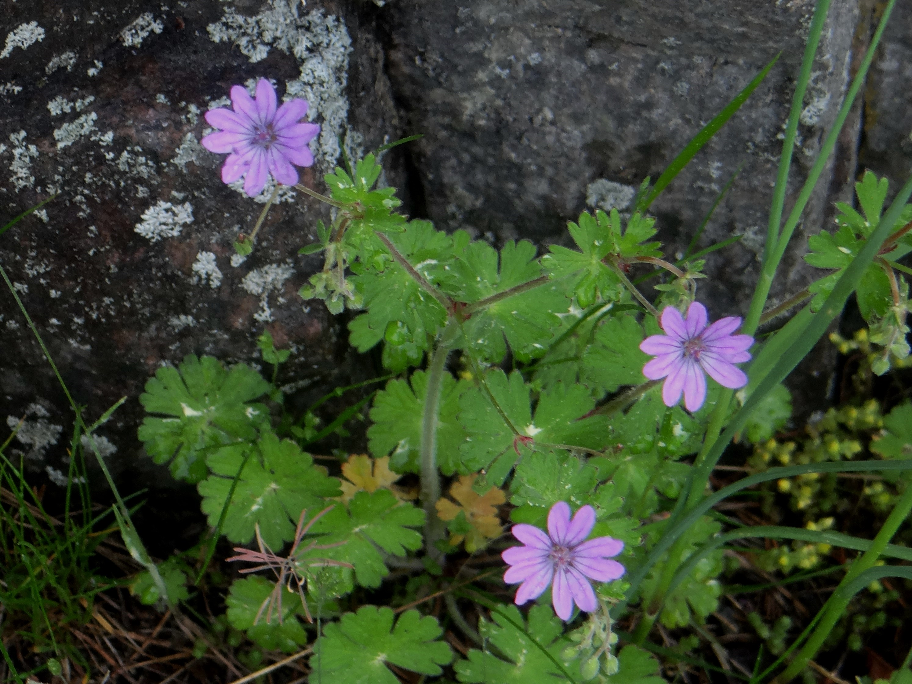 Askerstorkenebb funnet på Nesodden